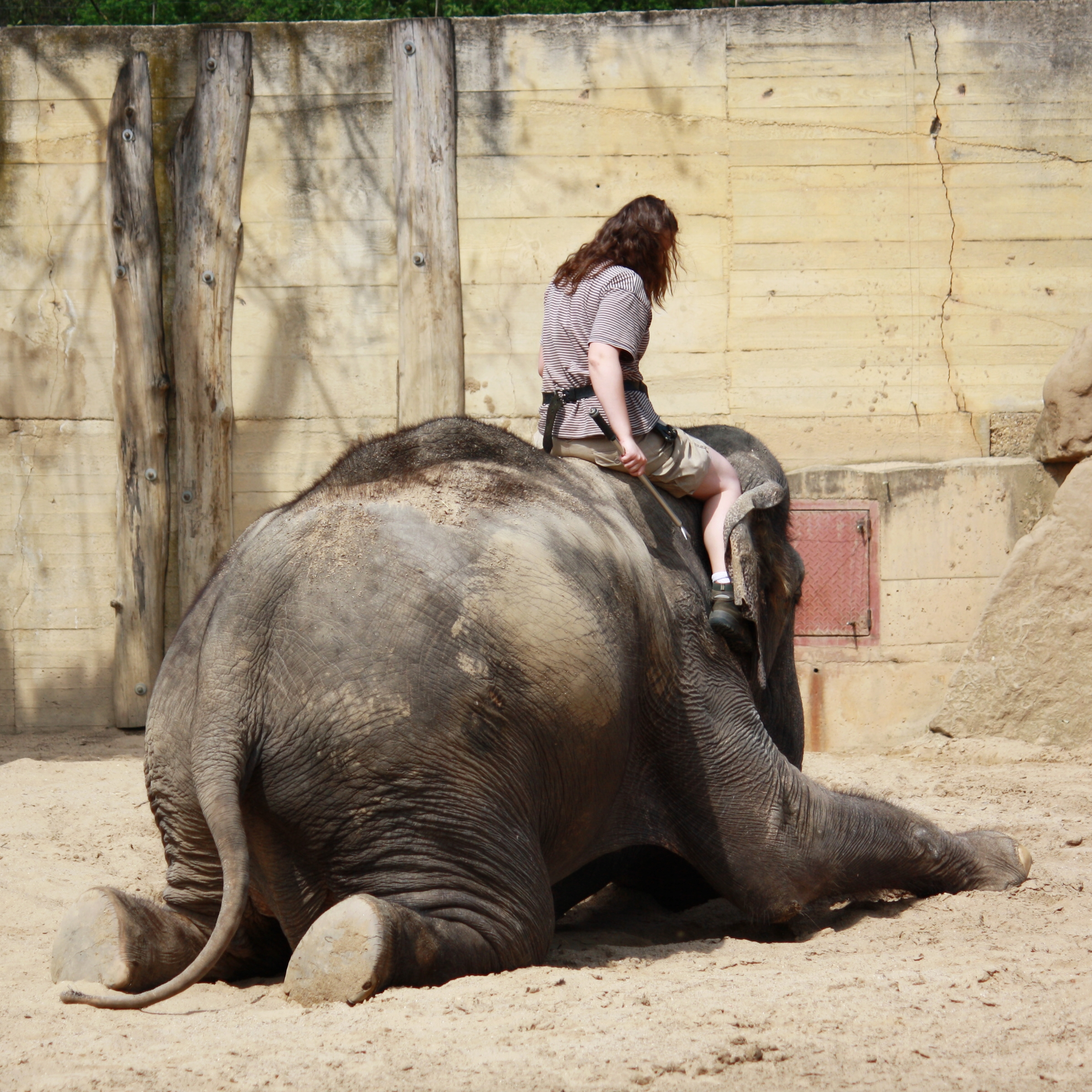 Zoo Praha